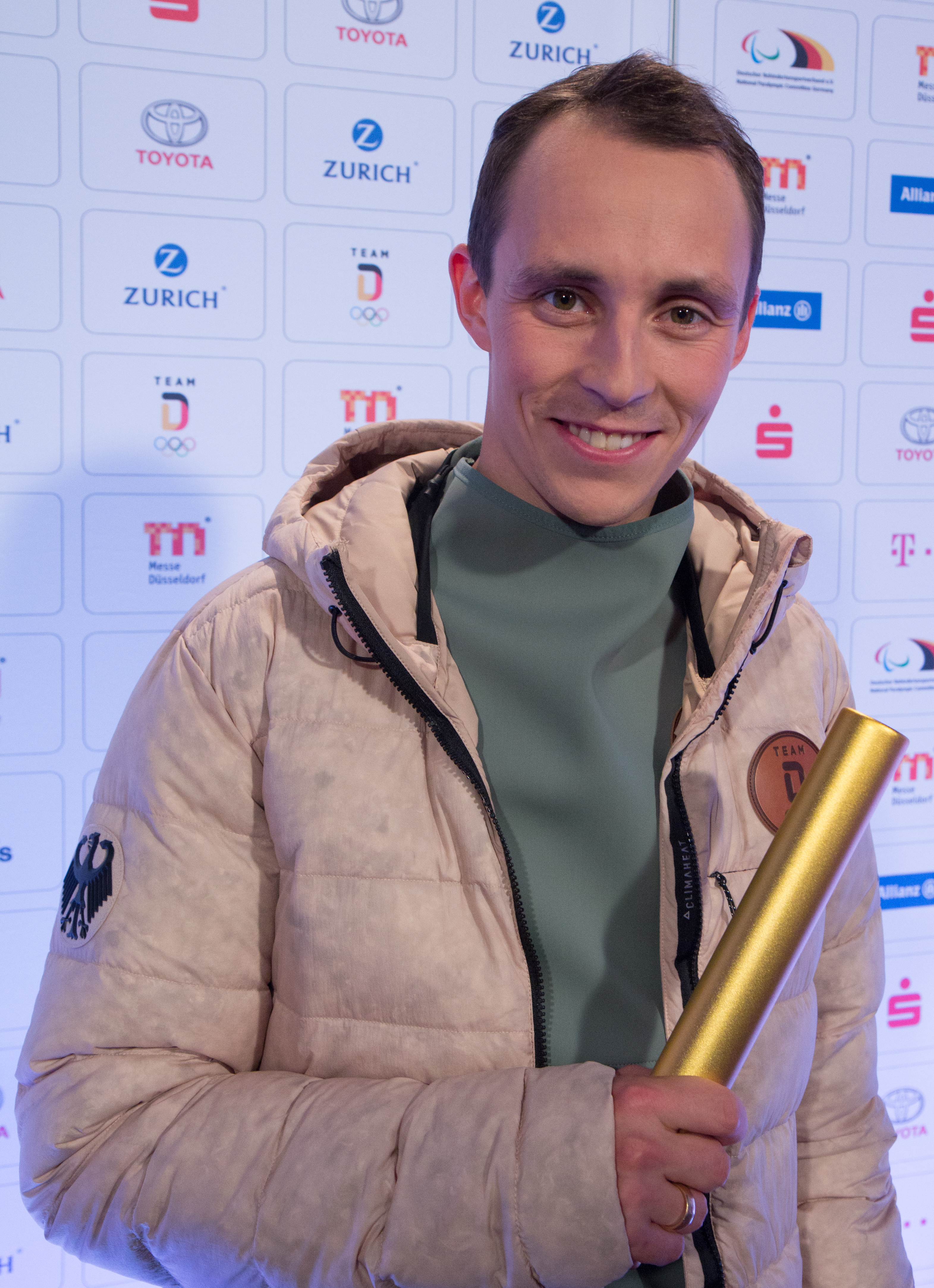 Präsentation der Bekleidung für PyeongChang am 2. November 2017 im Alten Kesselhaus des Areal Böhler in Düsseldorf. Eric Frenzel